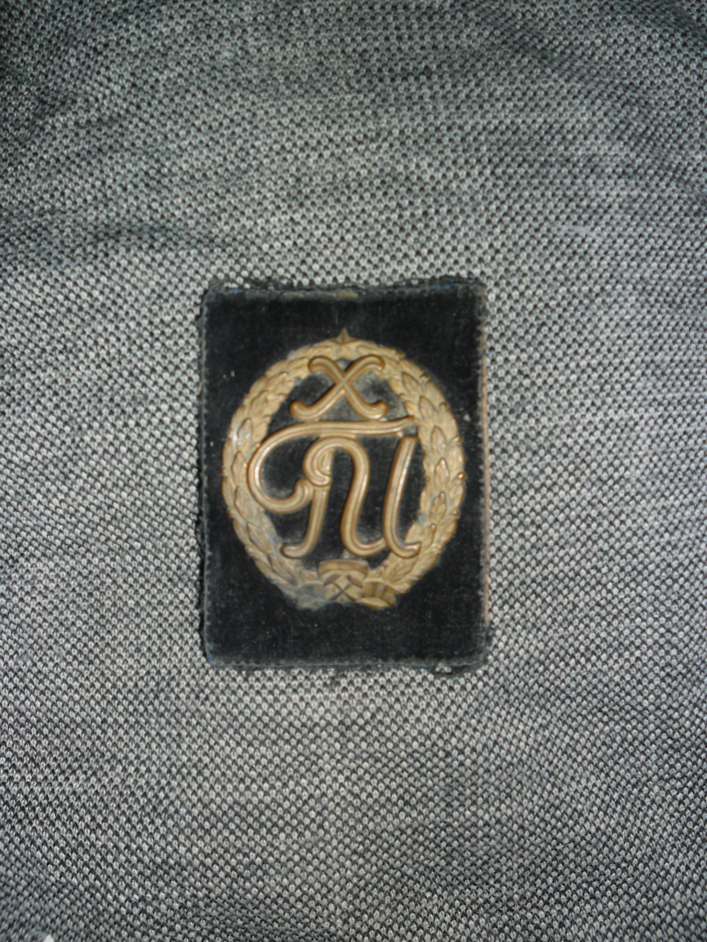 Харьковский горный институт. Нарукавная эмблема (1940-е годы).